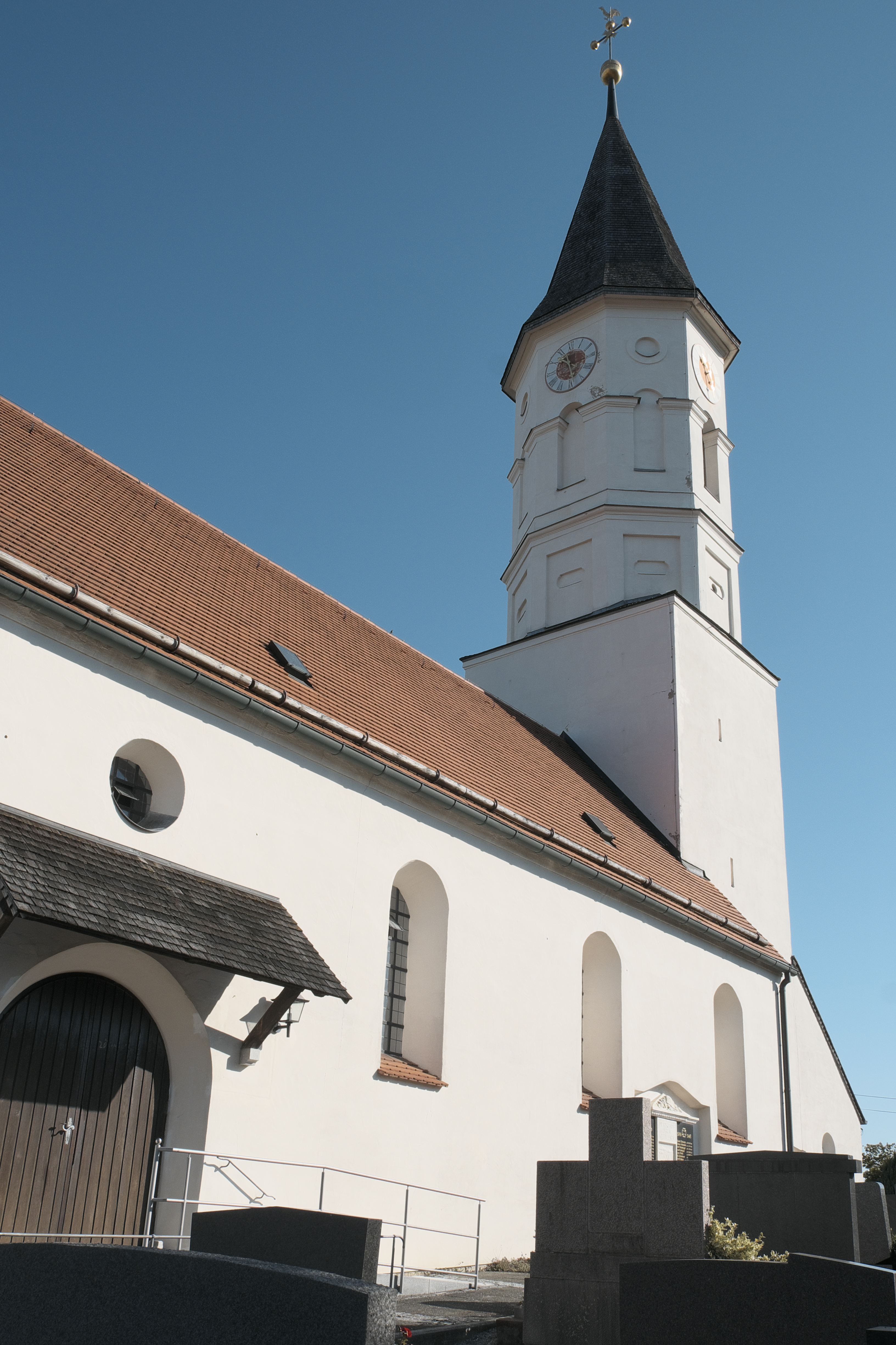 Katholische Filialkirche St. Bartholomäus und Valentin in Überacker (Maisach) im Landkreis Fürstenfeldbruck (Bayern/Deutschland)